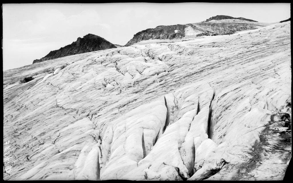 Imatge